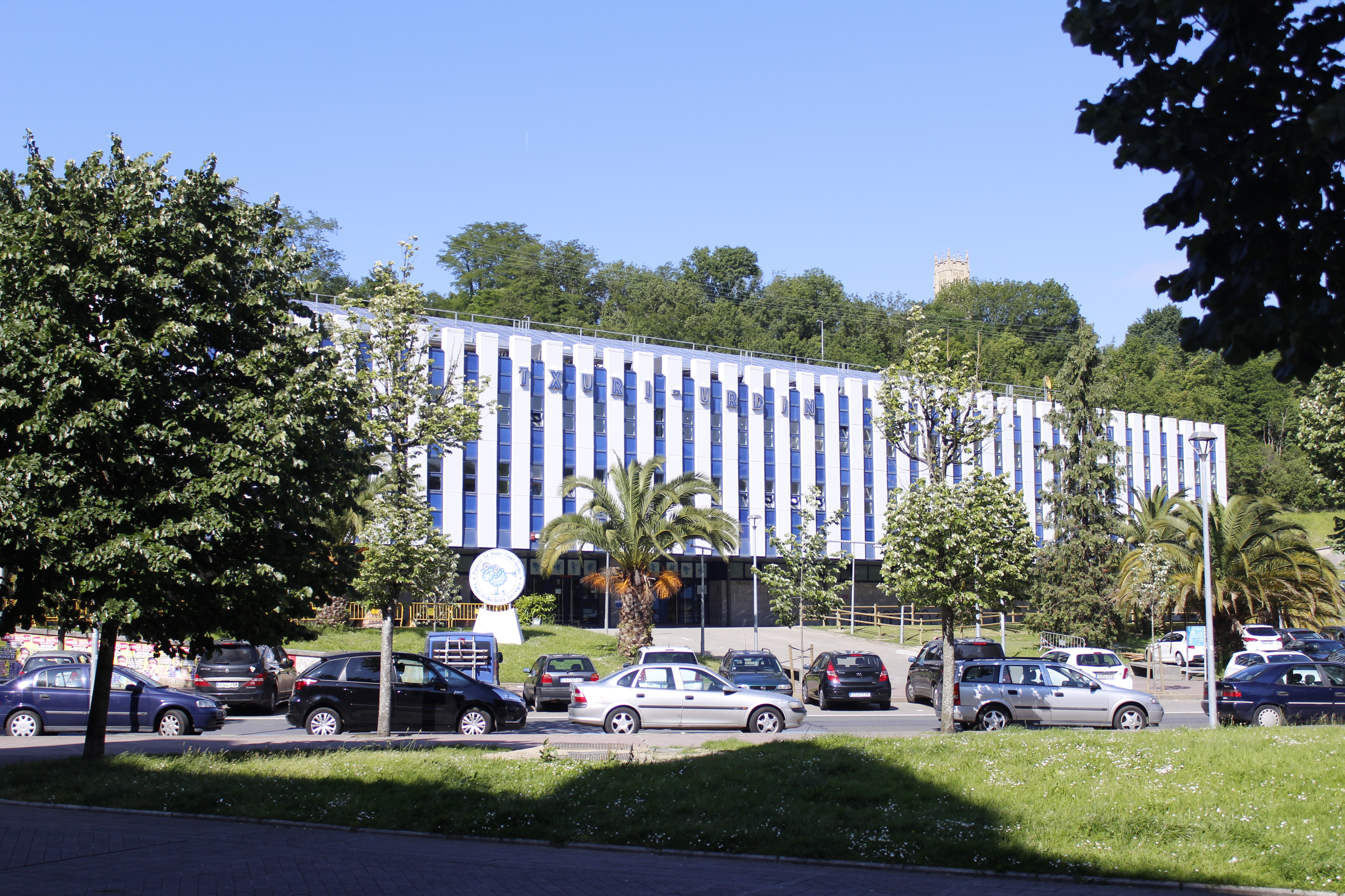 Txuri Urdin IHTren eraikina, Donostian, Amara auzoan